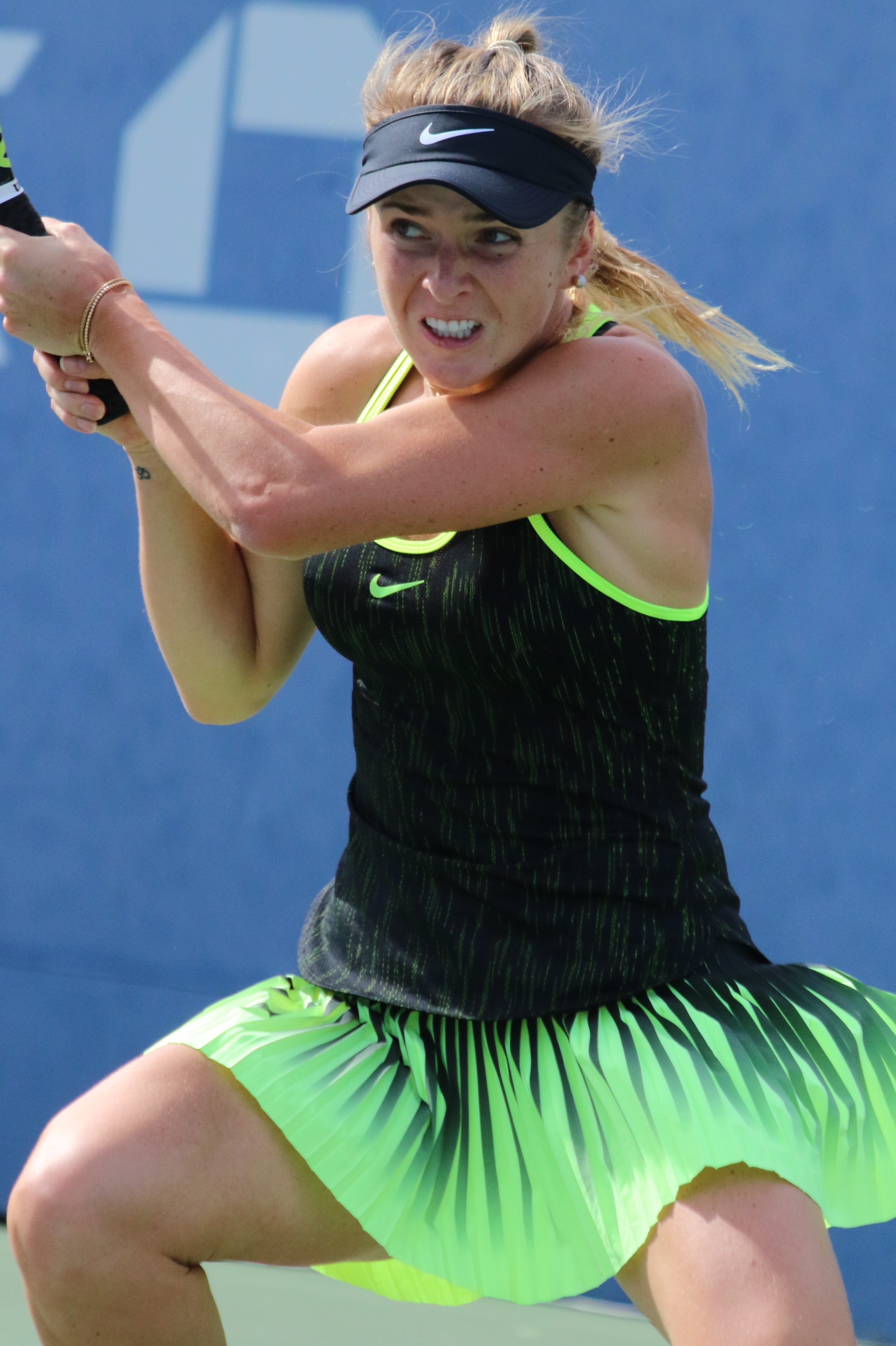 Svitolina US16 (34)